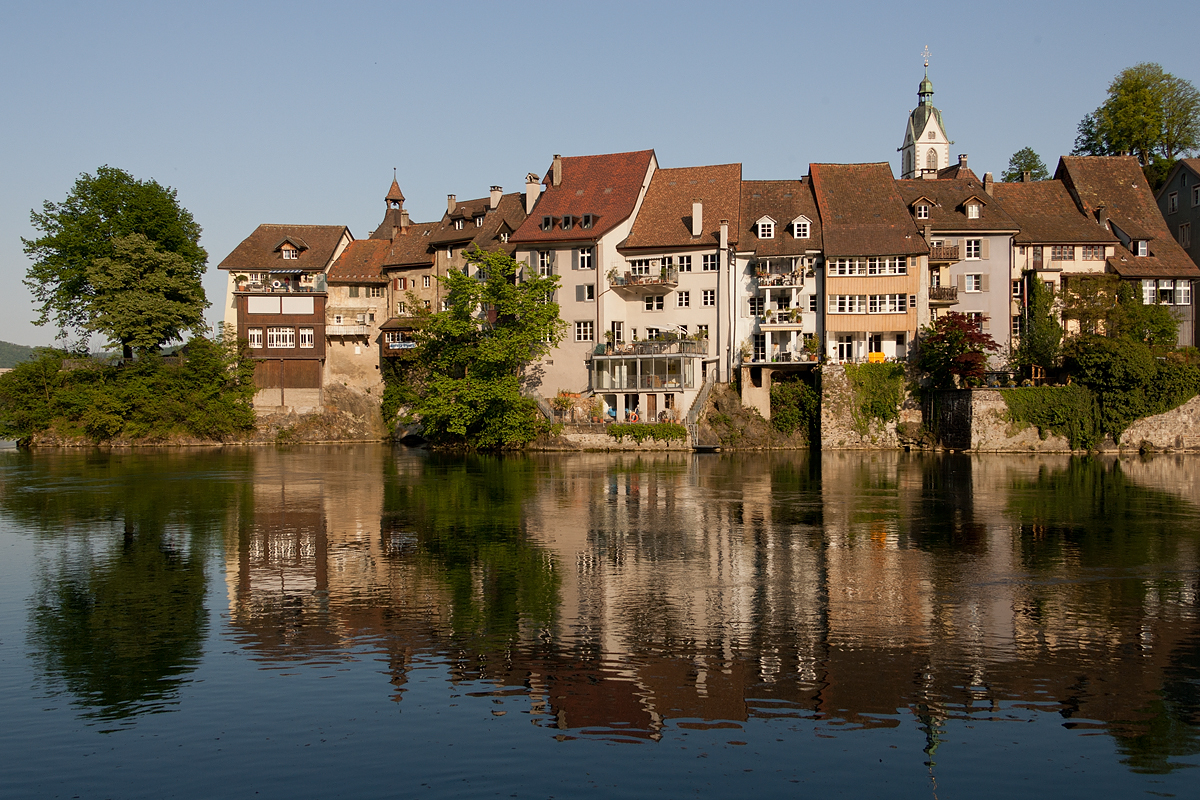 Blick über den Rhein zum schweizerischen Laufenburg (AG)